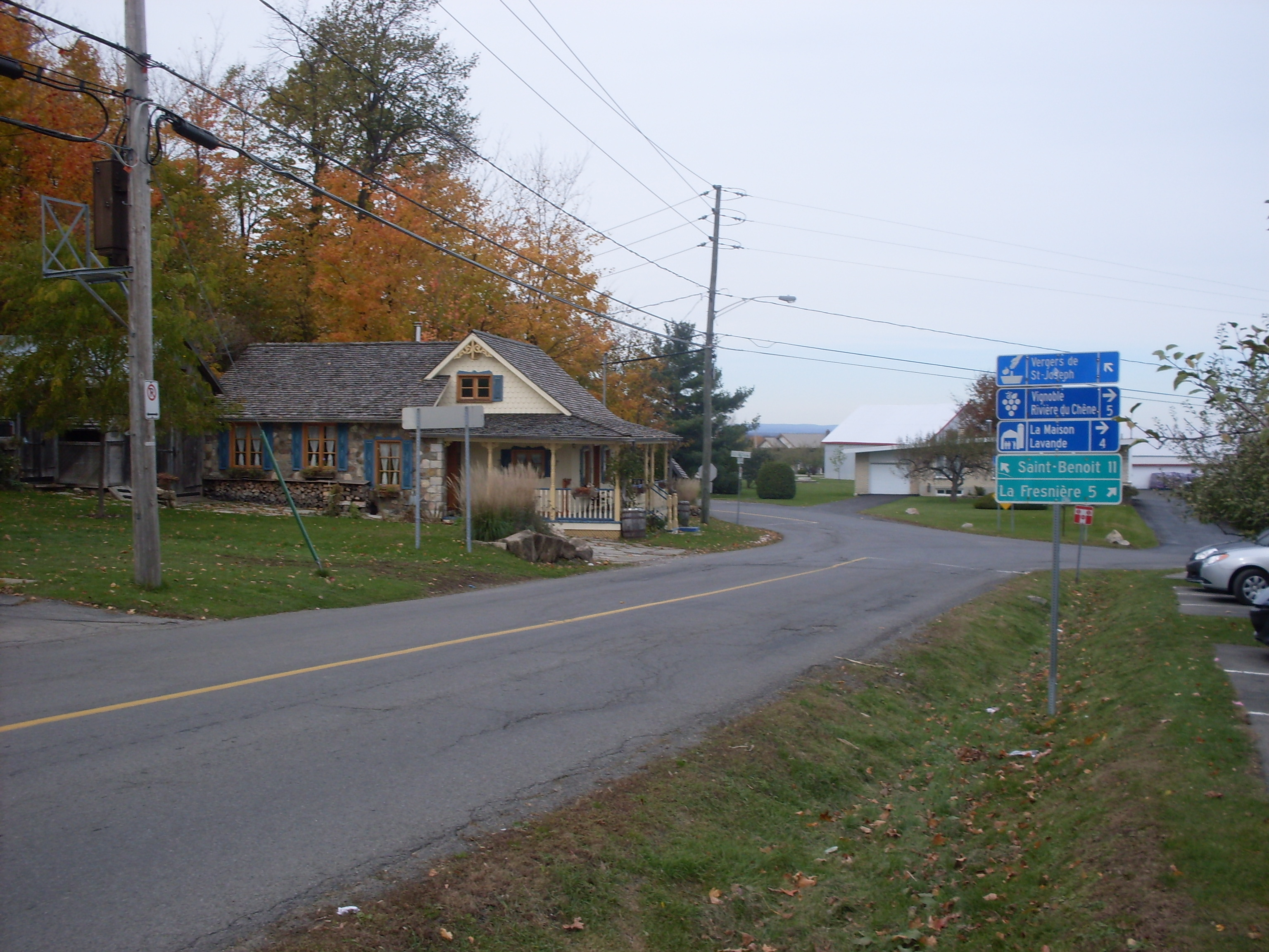 Municipalité de Saint-Joseph-du-Lac, intersection du Chemin Principal et Montée McCole